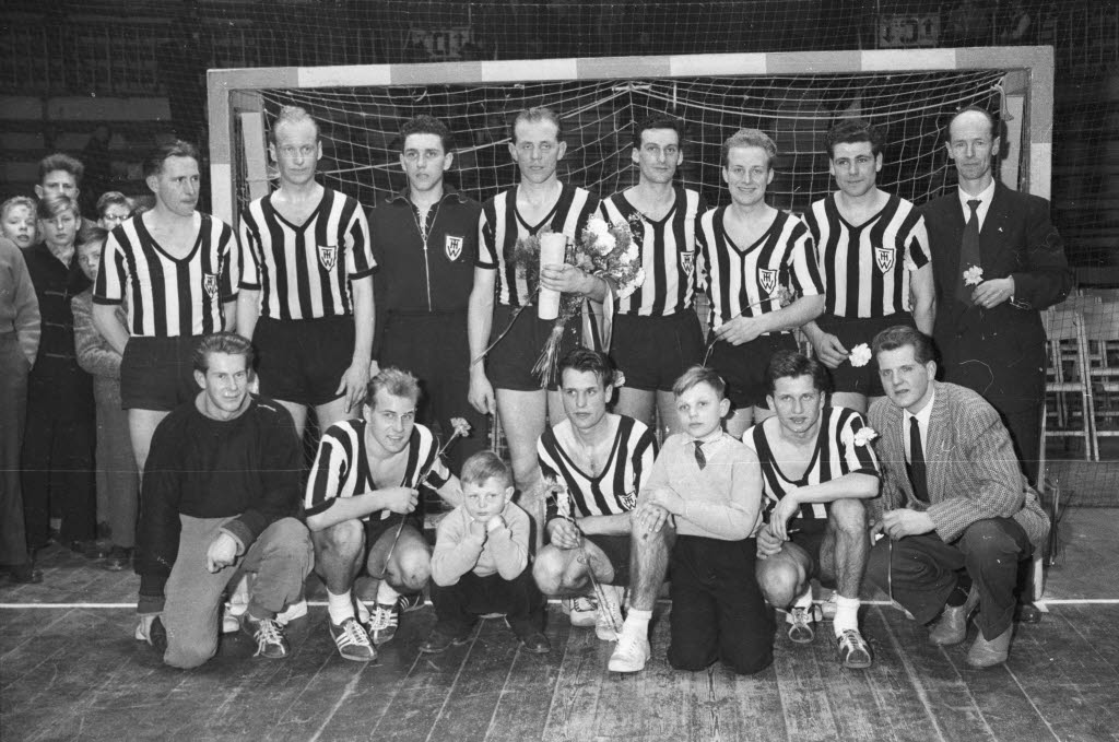 ist Deutscher Handballmeister 1957. Mannschaftsfoto in der Ostseehalle nach dem 7:5 Sieg über FA Göppingen. Hintere Reihe v.l.n.r.: Heinz Riechmann, Heinz-Georg Sievers, Hans-Jürgen Hinrichs, Heinrich Dahlinger, Hans Lietz, Gerd Beck, Arthur Heinzel, Trainer Fritz Westheider. Vordere Reihe v.l.n.r.: Gert Knop, Kurt Bartels, Uwe Dahlinger, Karl-Friedrich Stoldt, Peter Dahlinger, Horst Ritke, Manfred Baller.